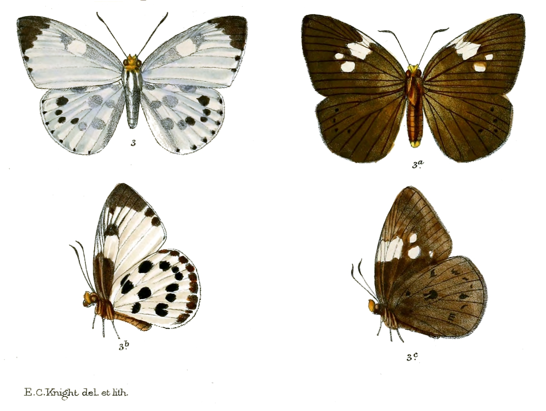 Calliana pieridoides= Capila pieridoides (male and female)